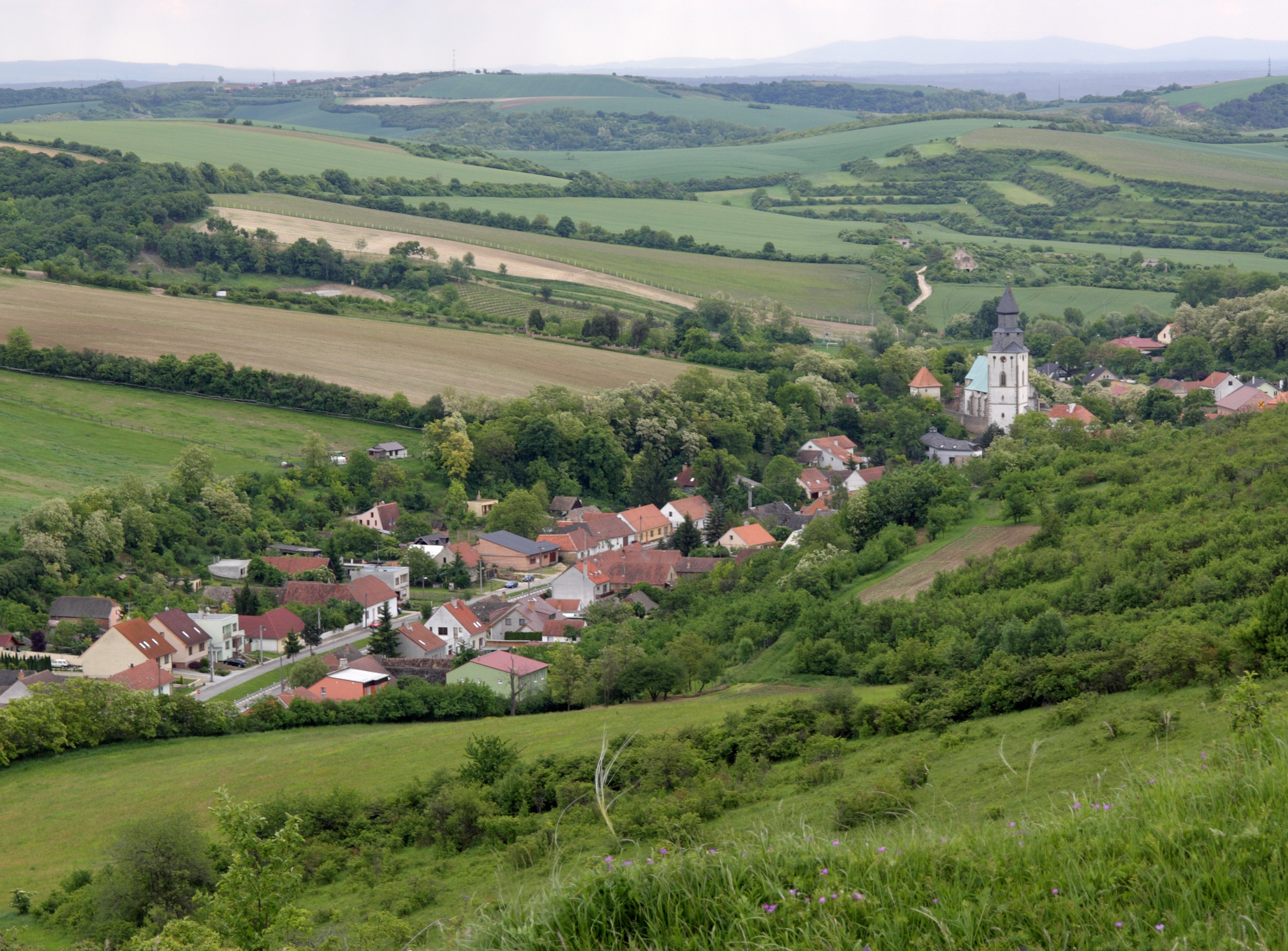 Kurdějov - pohled od Kamenného vrchu.